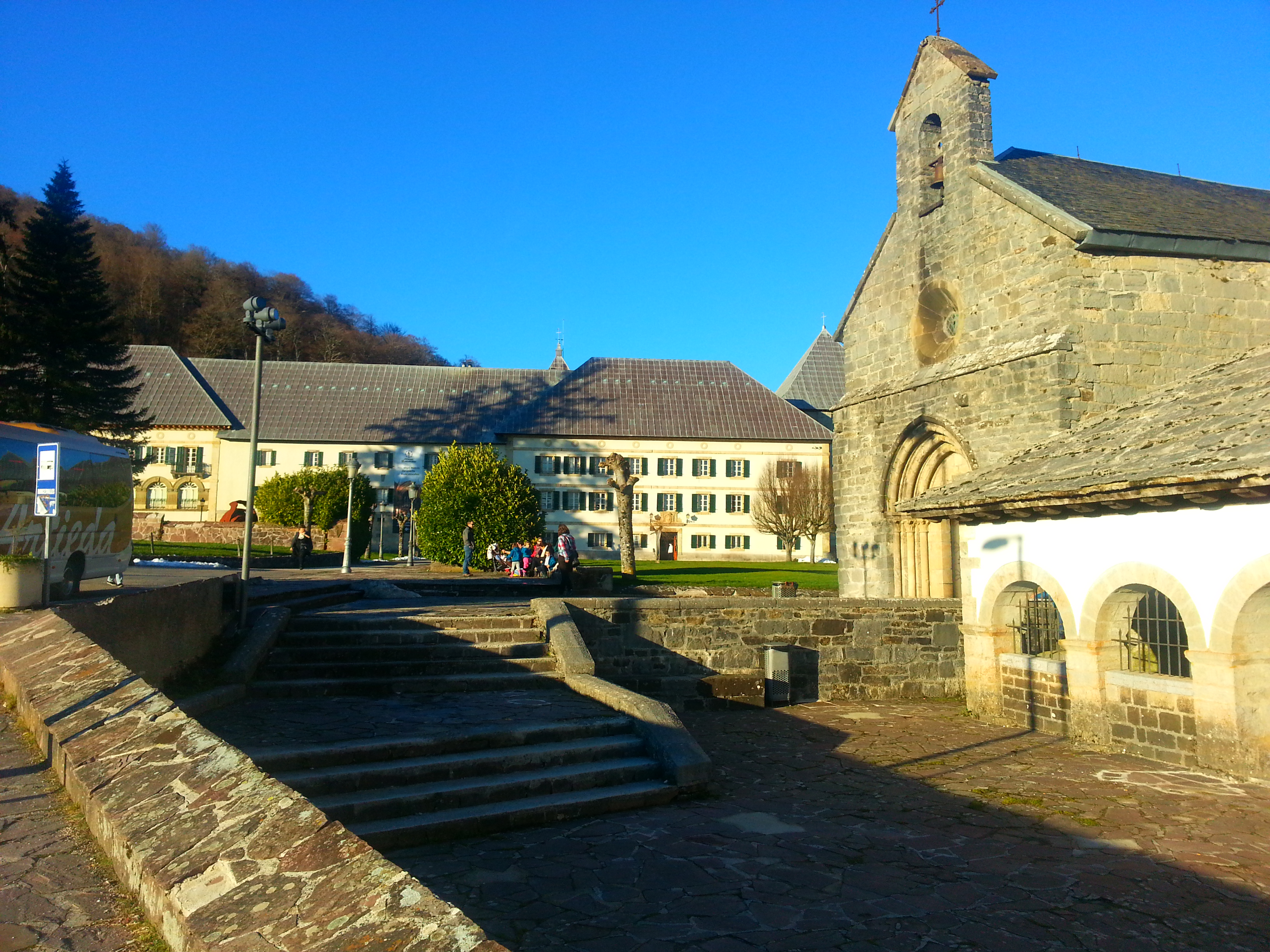 Roncevaux